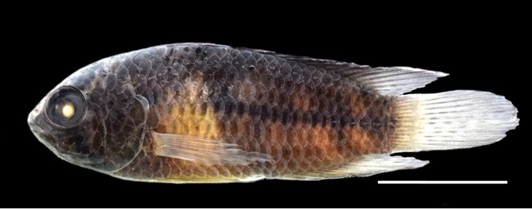 Nannacara aureocephalus. Río Oyapock, Brasil. Barra escala: 1 cm. Melo BF, Benine RC, Britzke R, Gama CS, Oliveira C (2016) An inventory of coastal freshwater fishes from Amapá highlighting the occurrence of eight new records for Brazil. ZooKeys 606: 127-140.